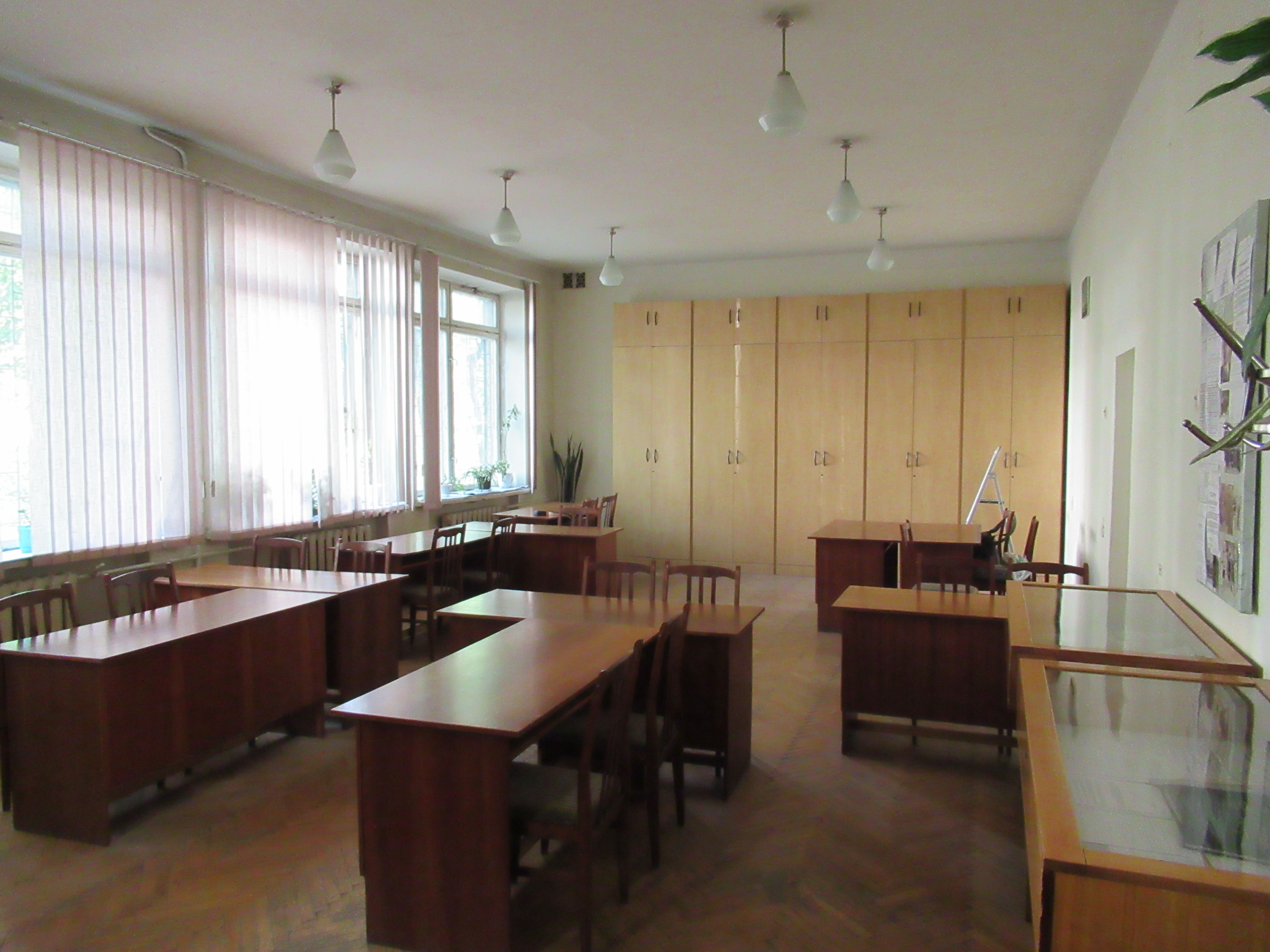 Государственный архив города Киева (читальный зал) (Киев, ул. Елены Телиги, 23)